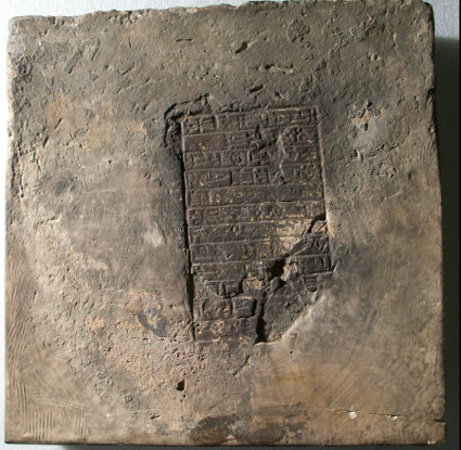 Cudurru, ou estela, com uma lista de reis da Segunda Dinastia de Isin (ou Quarta Dinastia da Babilônia).